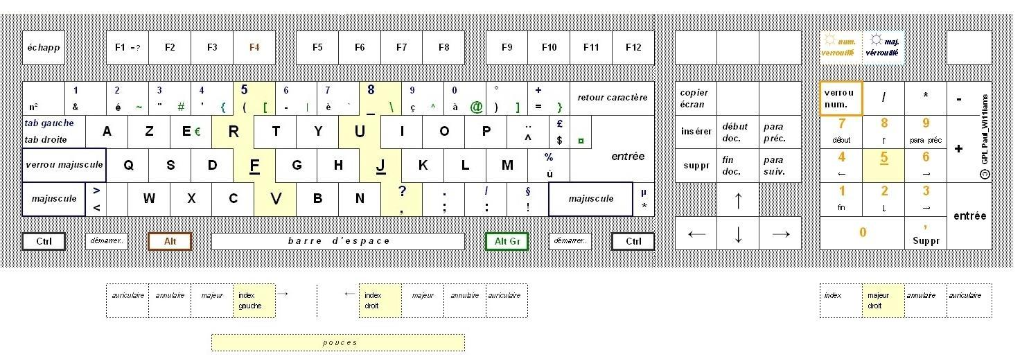 auteur: Paul Williams. C'est un schéma de dactylographie adapté au clavier informatique, suivant le texte de l'article "clavier informatique". Le positionnement des mains sur la pavé numérique est basé sur l'observation réelle du travail des opératrices de saisie. L'usage des touches du clavier s'accorde à tous les manuels de dactylographie. l' tableau XLS utilisé pour générer ce fichier JPG est disponible en GNU à [1]. La transformation de XLS en JPG a été réalisée par la fonction "impr écran". Un connaisseur pourrait, en partant du document d'origine, améliorer le rendu de l'image.7 septembre 2006 à 16:17 (CEST)Catégorie:schémas --Paul Williams 7 septembre 2006 à 18:20 (CEST)